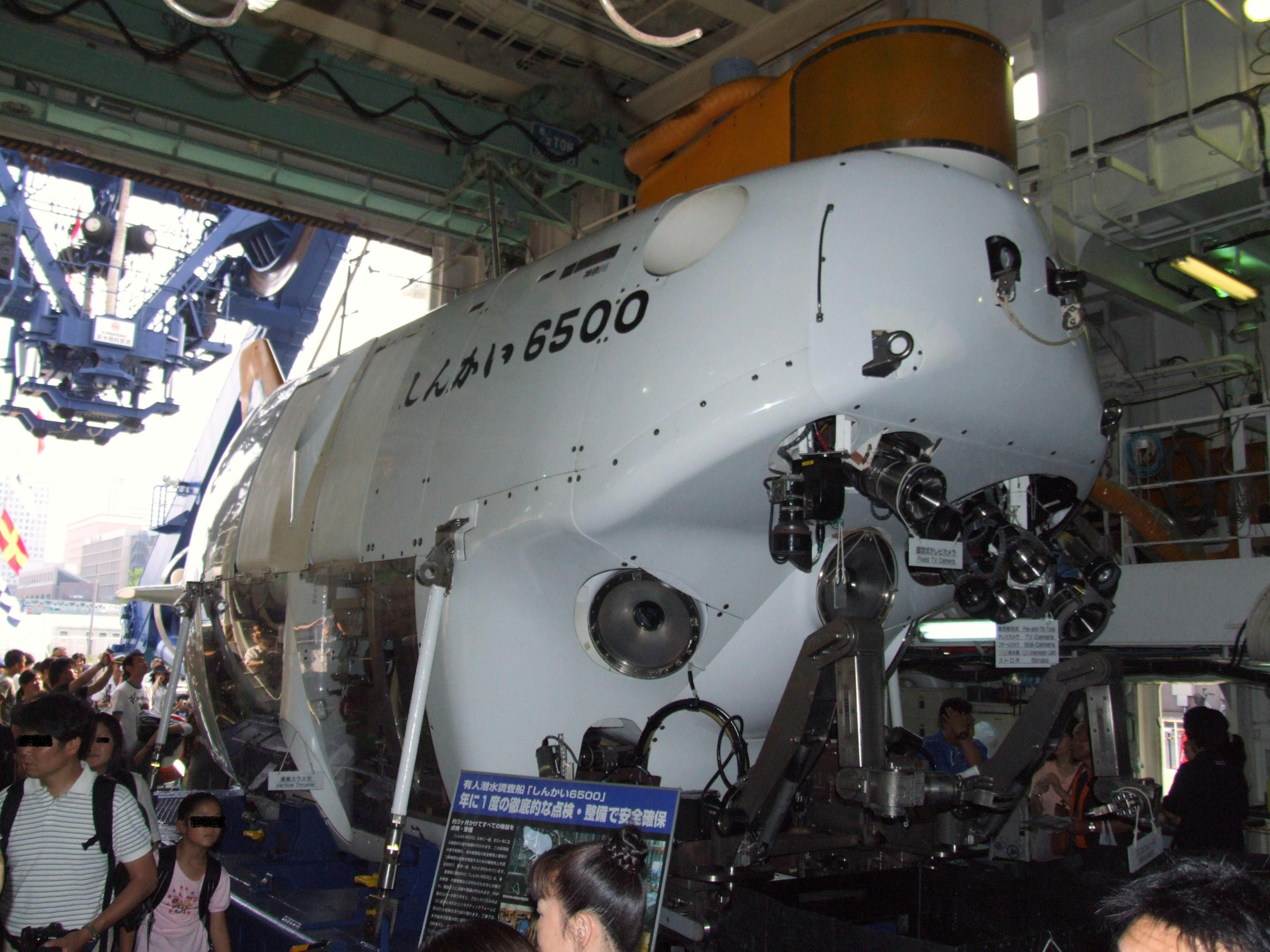 しんかい6500（横浜港開港150年での母船よこすかの船内開放での撮影）